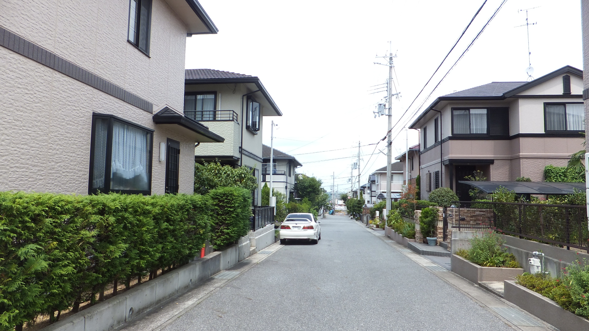 兵庫県三木市志染町青山2丁目 青山2丁目集会所